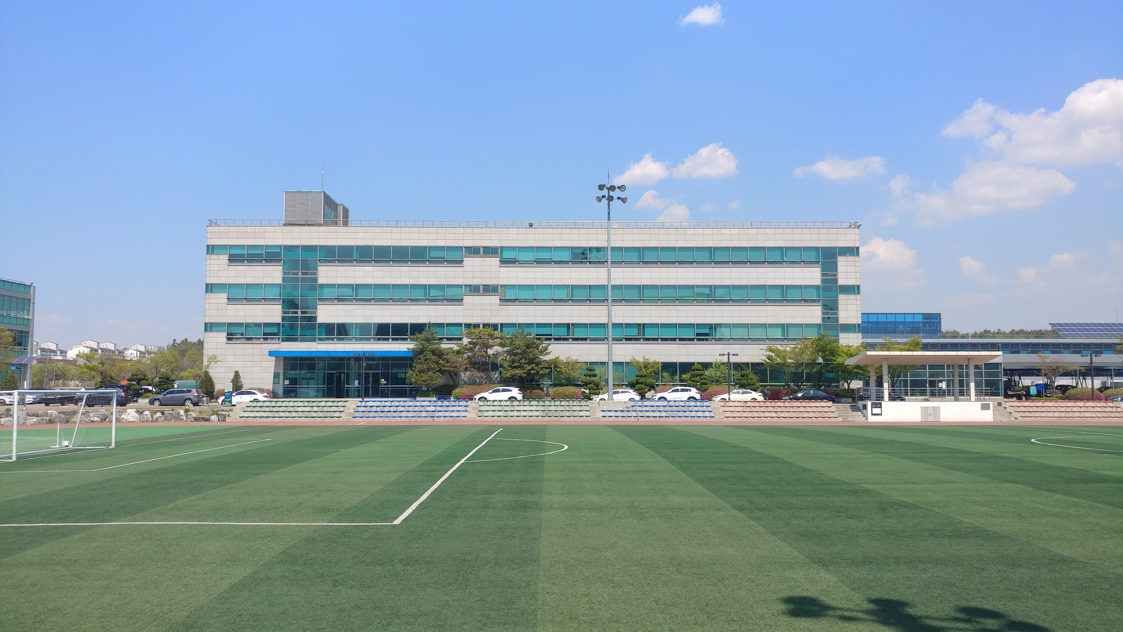 경기과학기술대학교 창조V관